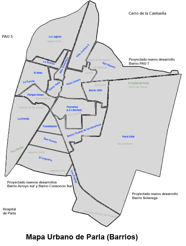 Mapa de Parla urbano de Parla vectorizado, donde aparecen los diferentes barrios y futuros proyectados.